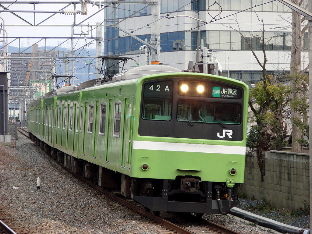 JR西日本 奈良電車区201系（久宝寺－加美）